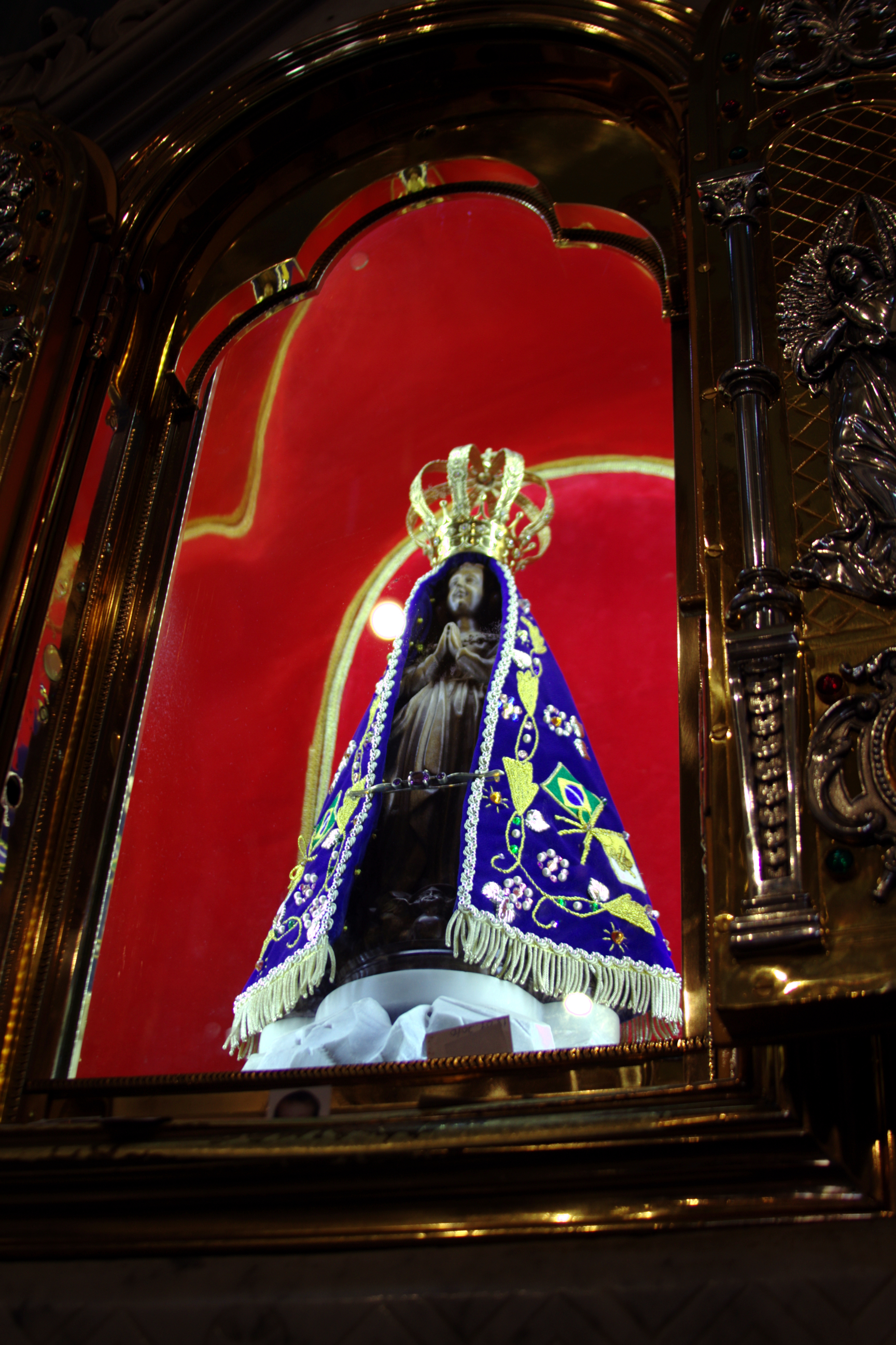 Basílica Velha de Aparecida